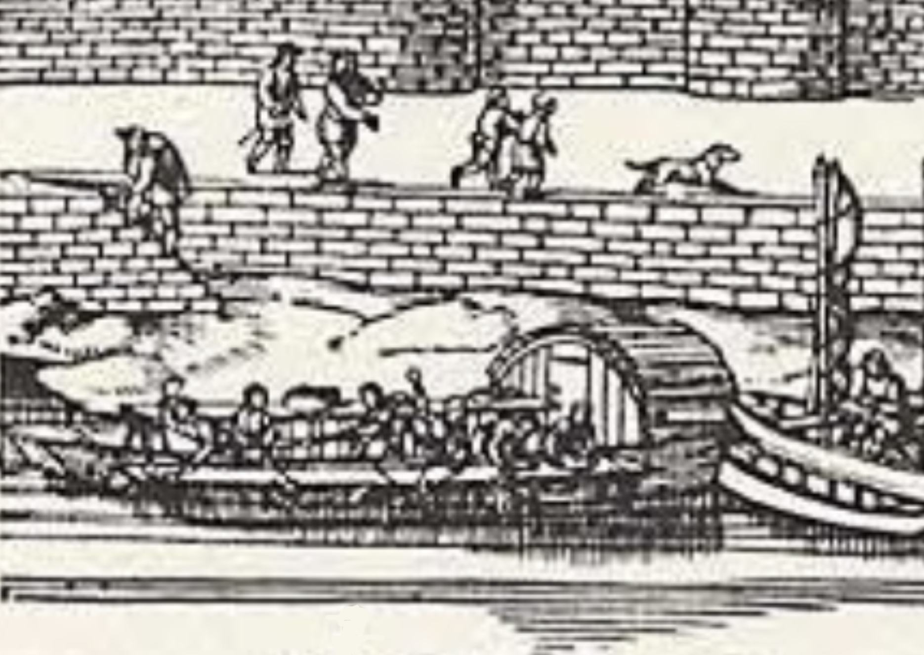 Vrouwen doen de was op een wasschip, twee vrouwen wringen een laken uit